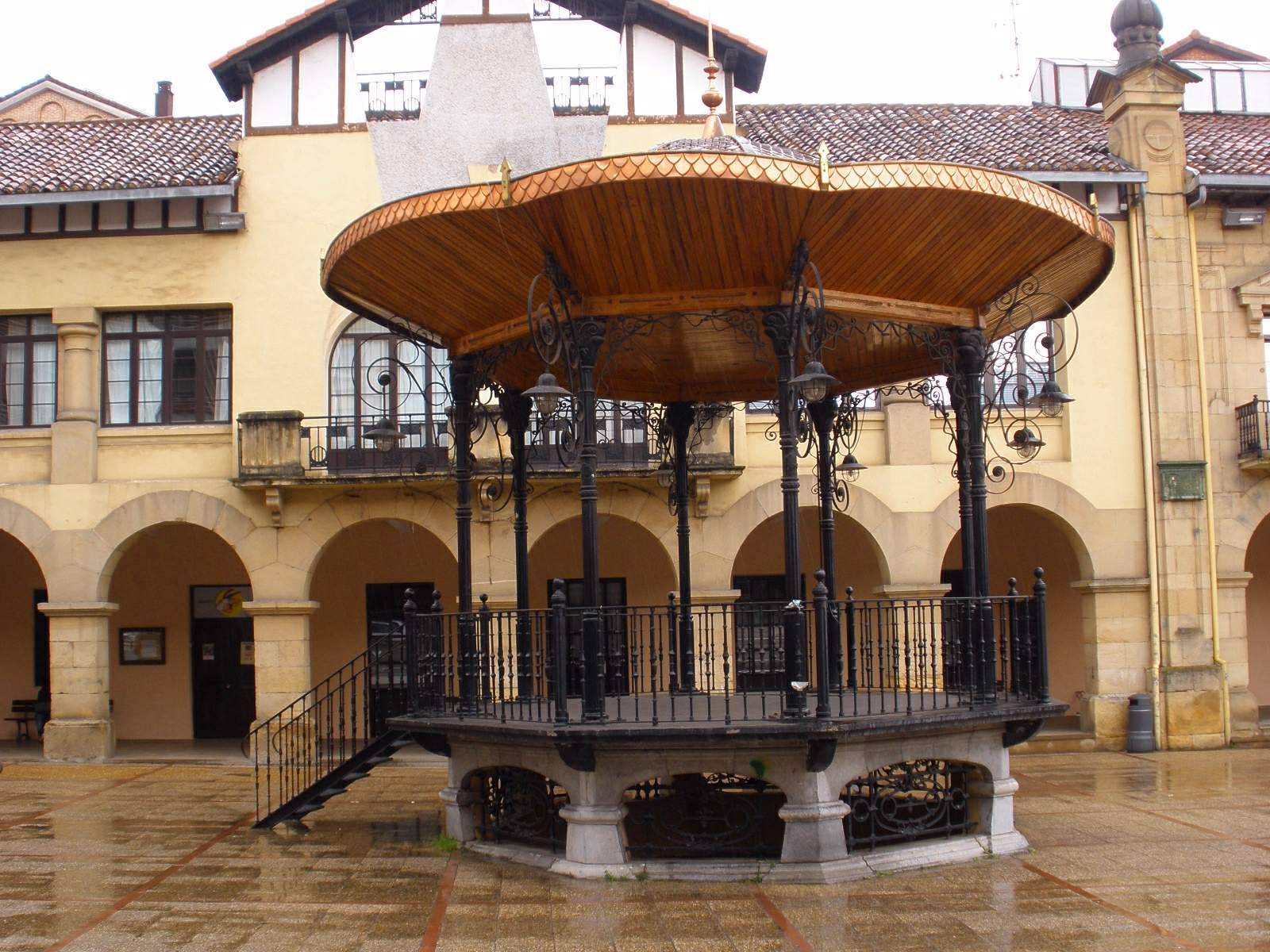 Beasain (Gipuzkoa)